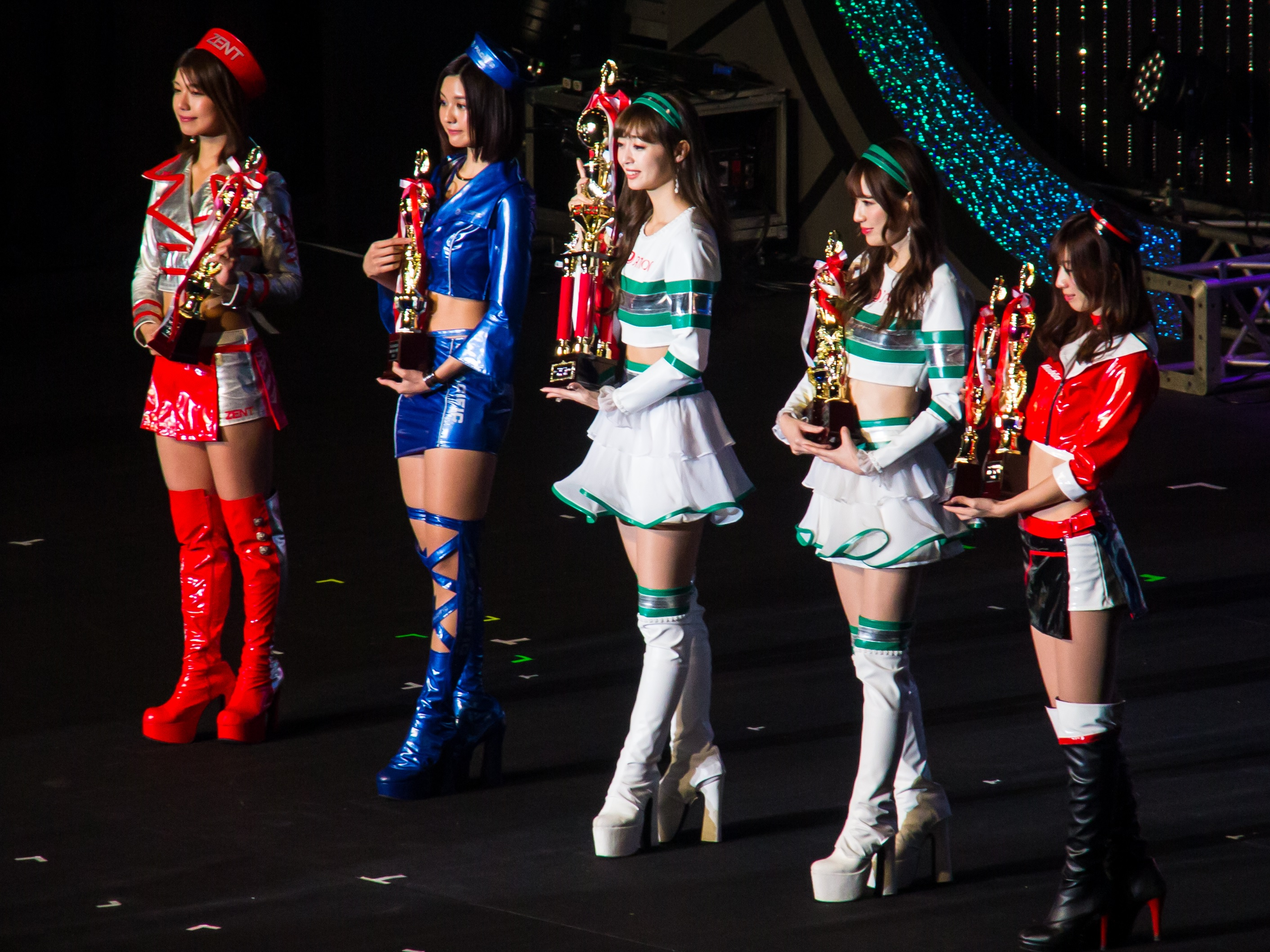 日本レースクイーン大賞2018 受賞者一同 林紗久羅（グランプリ）、藤木由貴、小越しほみ、林ゆめ、生田ちむ